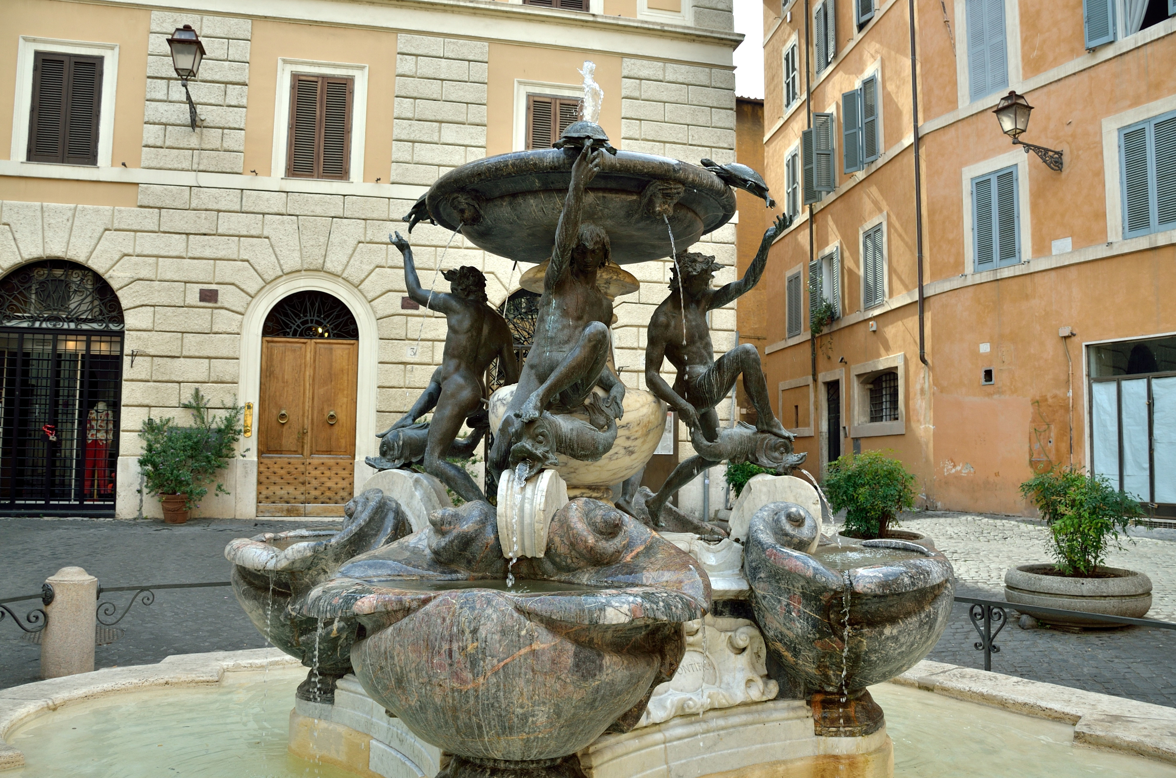 Fontana di piazza Mastai This is a photo of a monument which is part of cultural heritage of Italy.